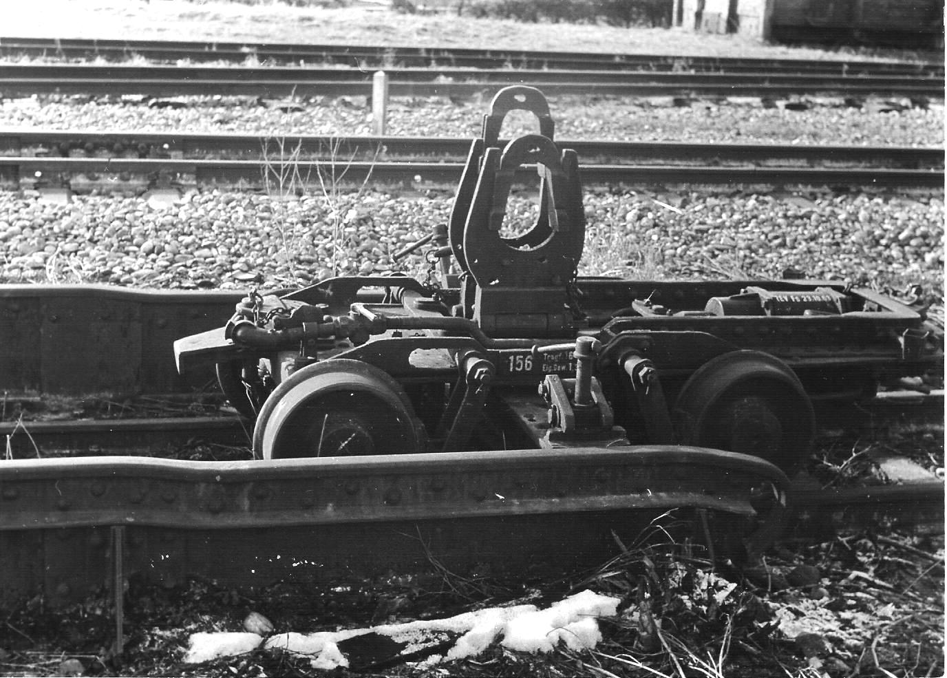 Rollbockgrube in Buchau/Federsee